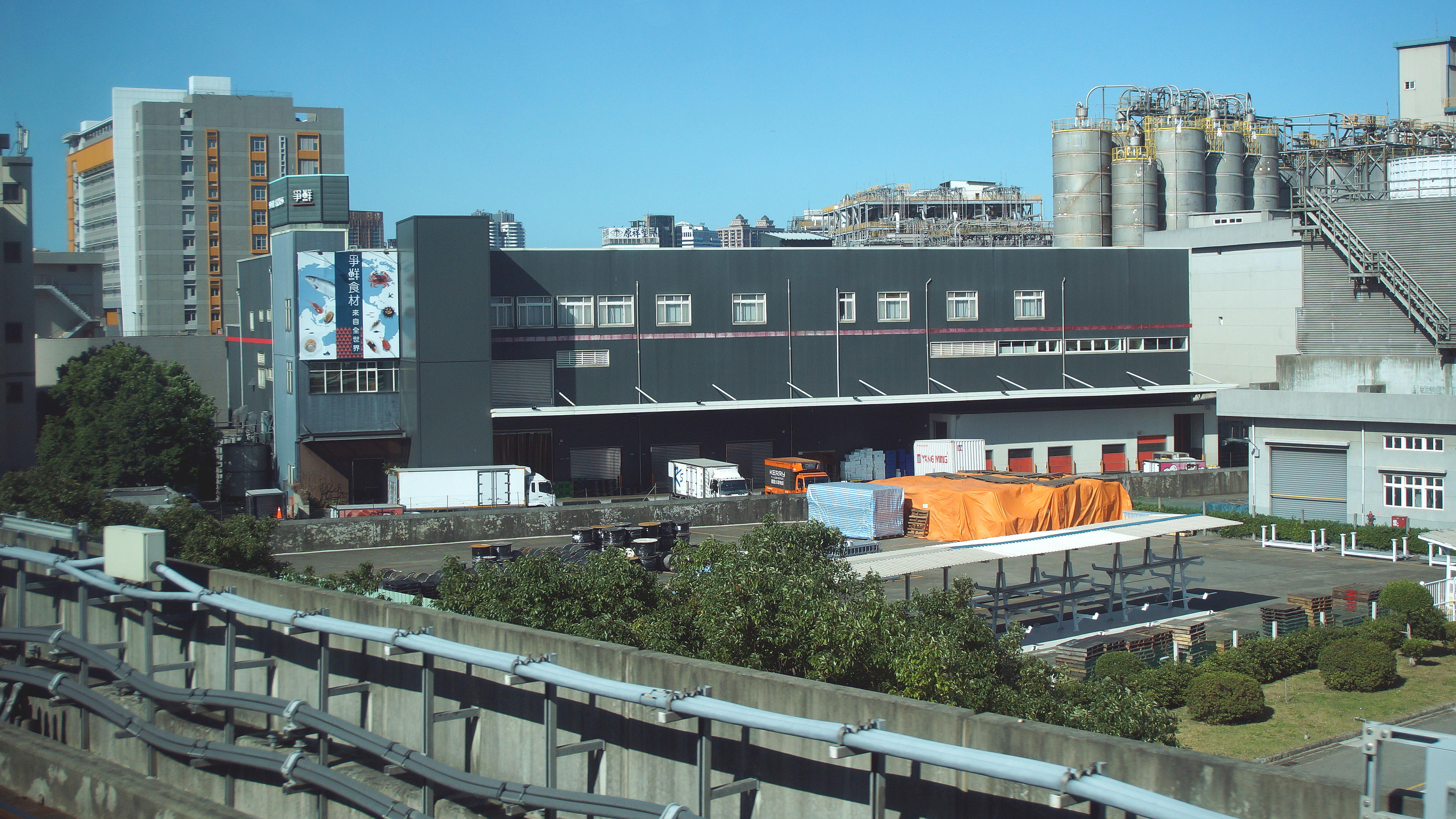 從桃園國際機場捷運直達車上拍攝爭鮮林口廠，地址：桃園市龜山區文化一路45號。